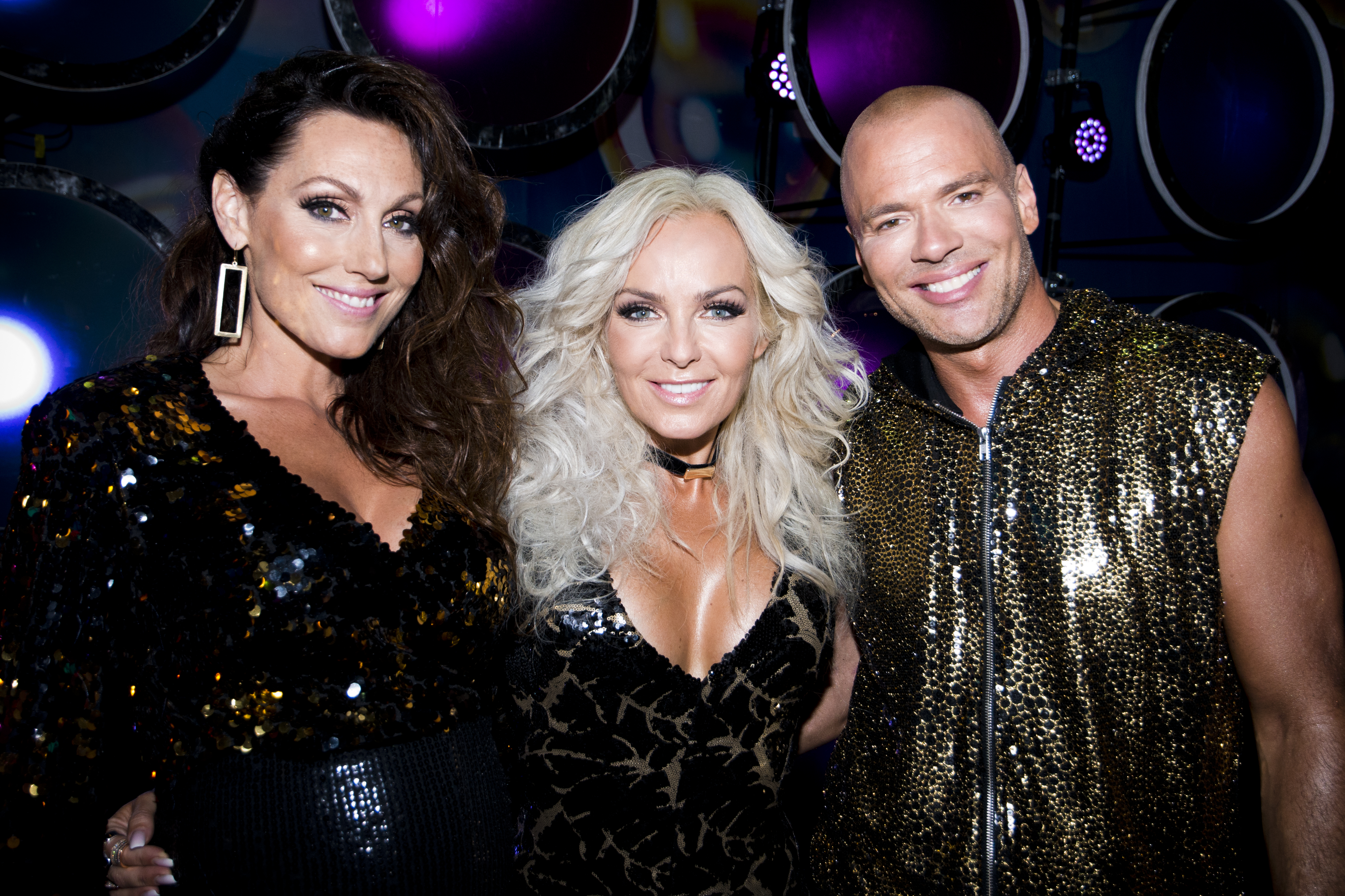 Alcazar på Sommarkrysset, Gröna Lund.